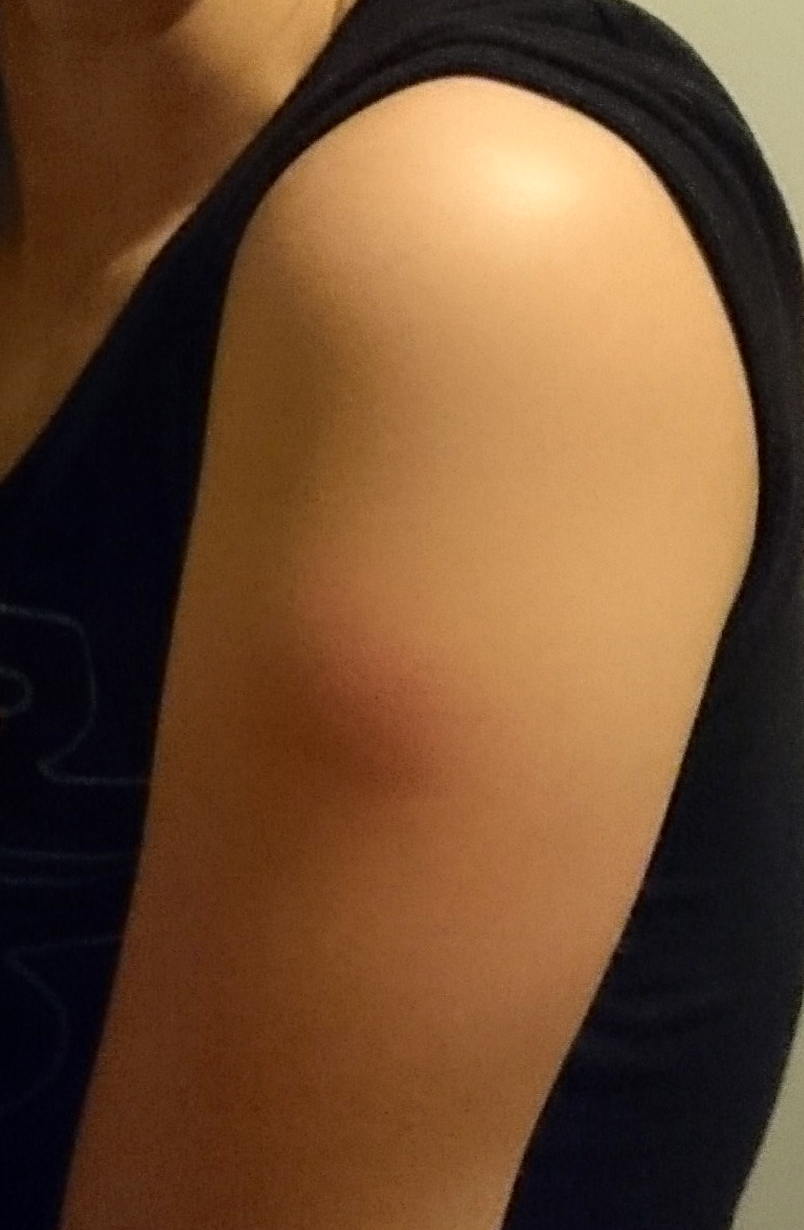 Impfreaktion um die Einstichstelle am Tag nach einer Tetanus-Impfung.